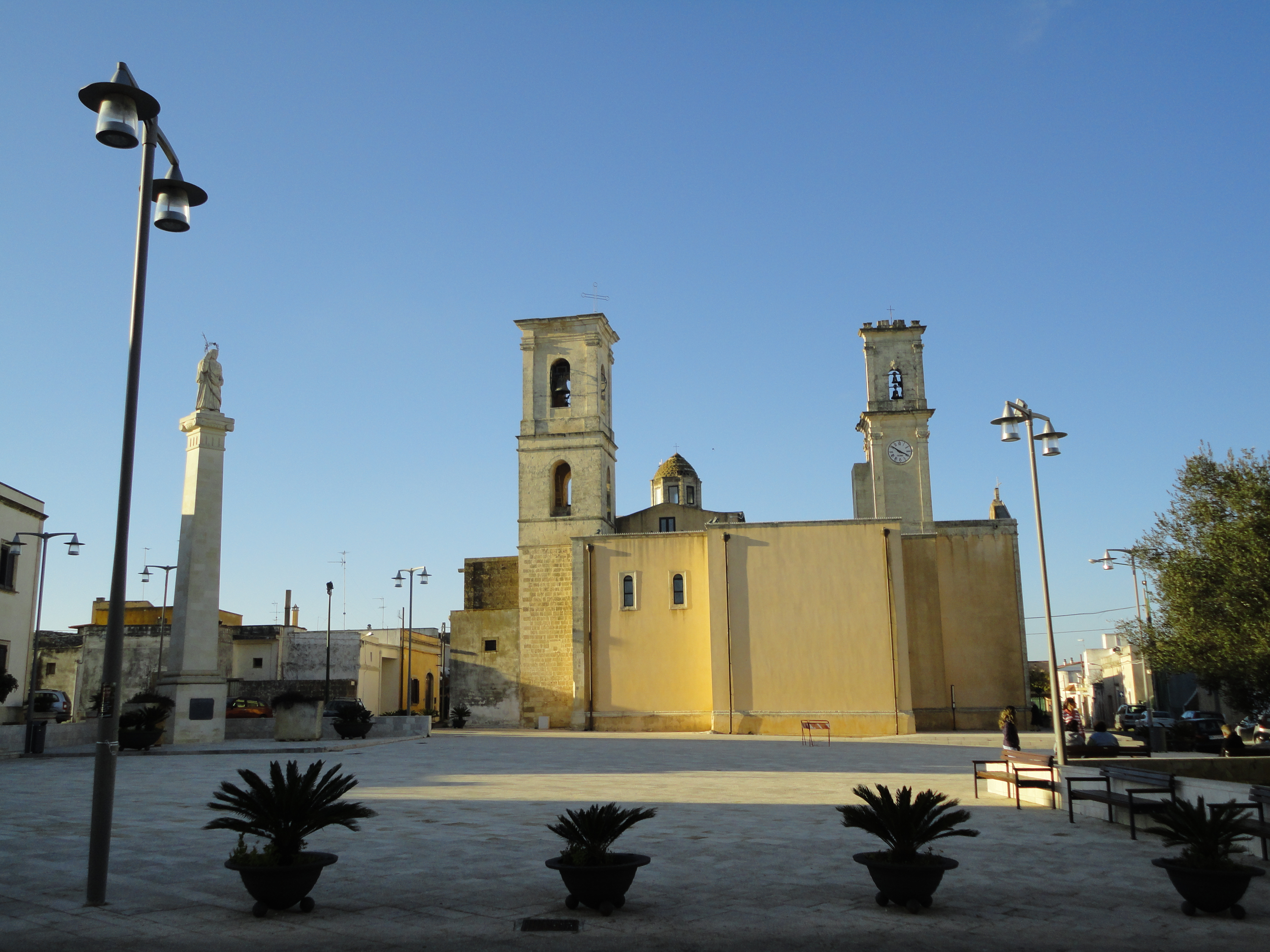 Piazza di Martignano Lecce